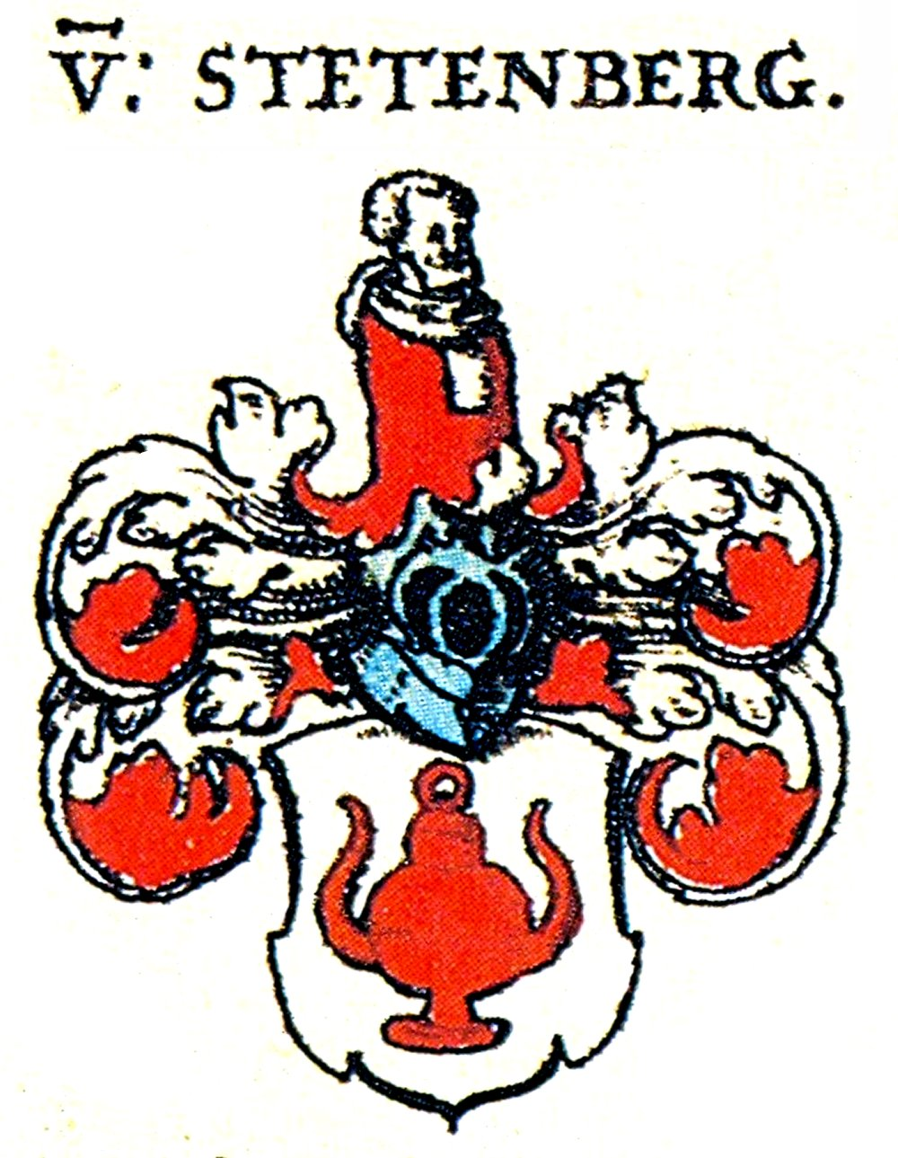 Wappen der Fränkischen Adelsfamilie Stettenberg